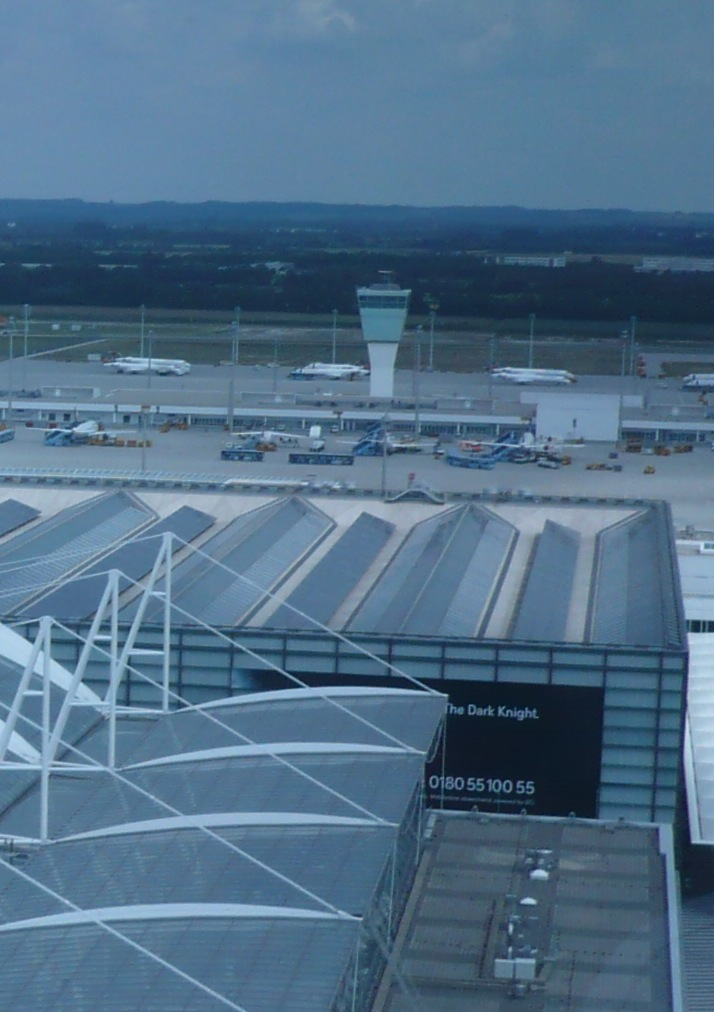 Photovoltaikanlage auf dem Dach der Haupthalle des Terminal 2 am Flughafen München